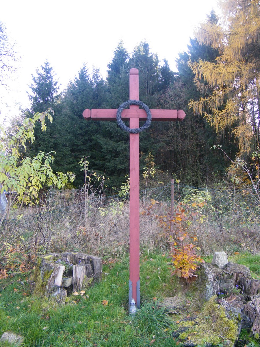 Kříž uprostřed Janovky